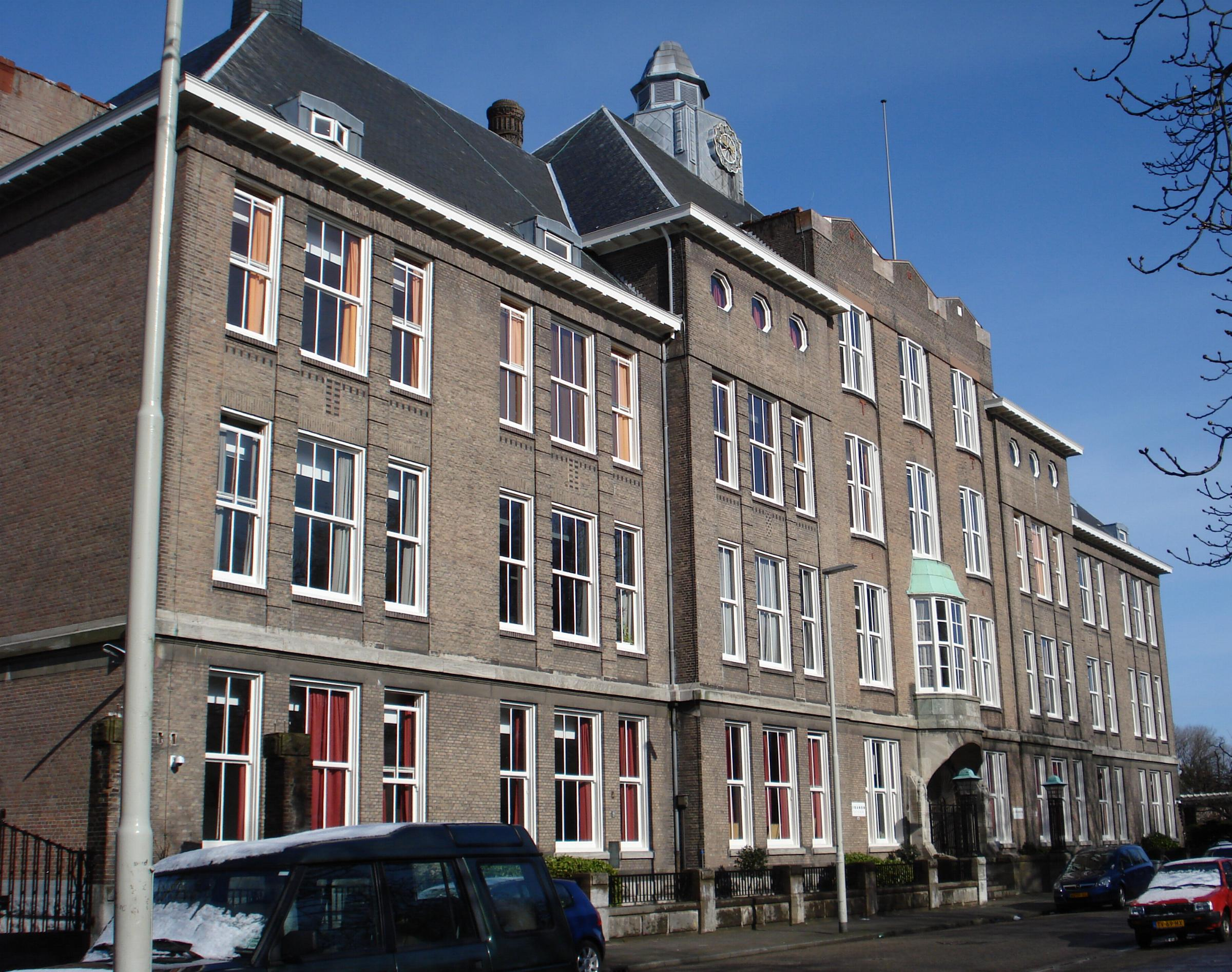 Rotterdam. Meisjes HBS in Mecklenburglaan. Rijksmonument.